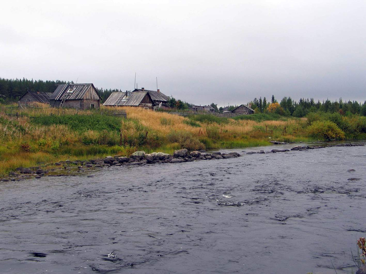 Муна